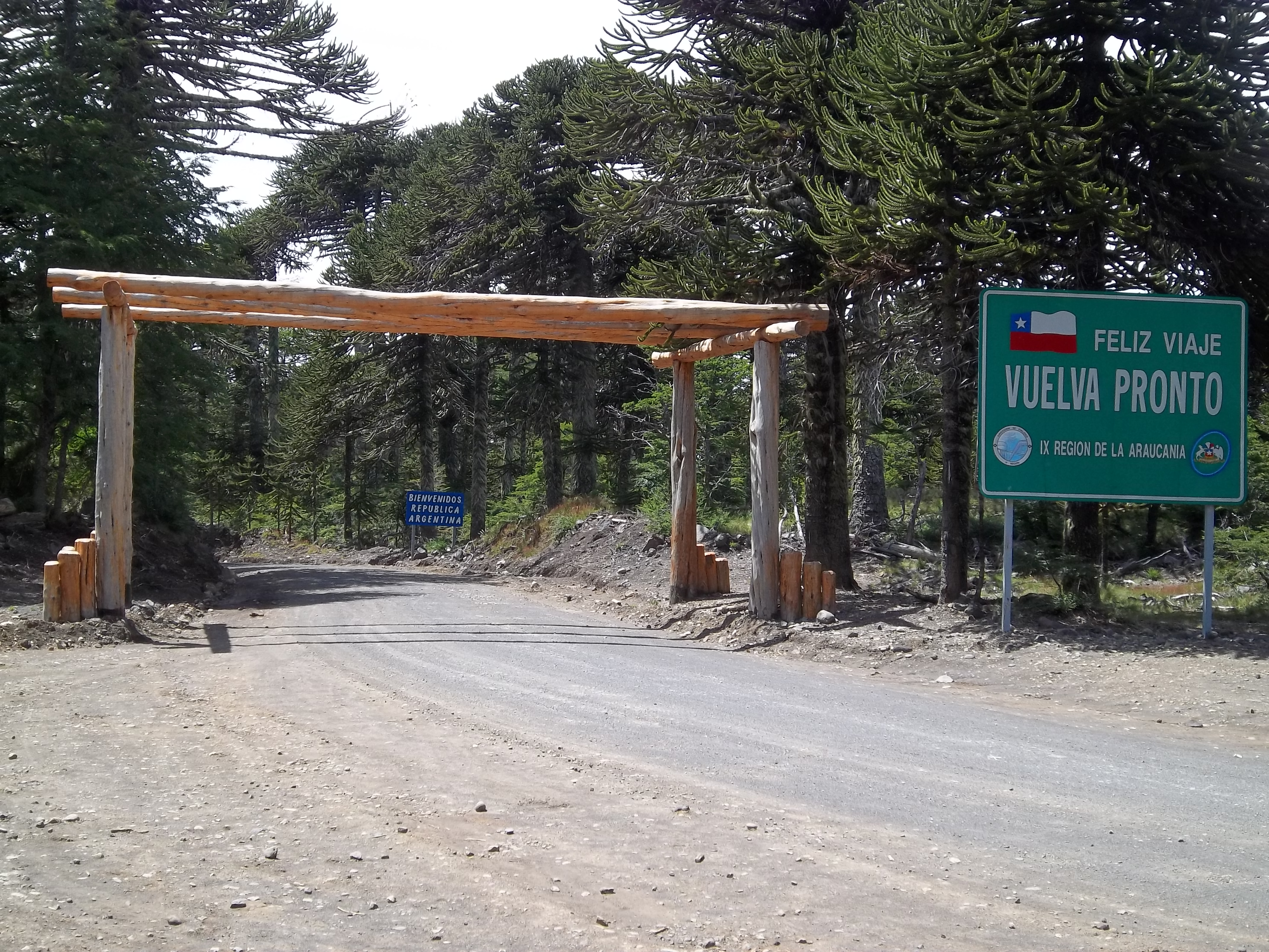 Paso Mamuil Malal junto al volcán Lanín en el límite entre Chile y Argentina.